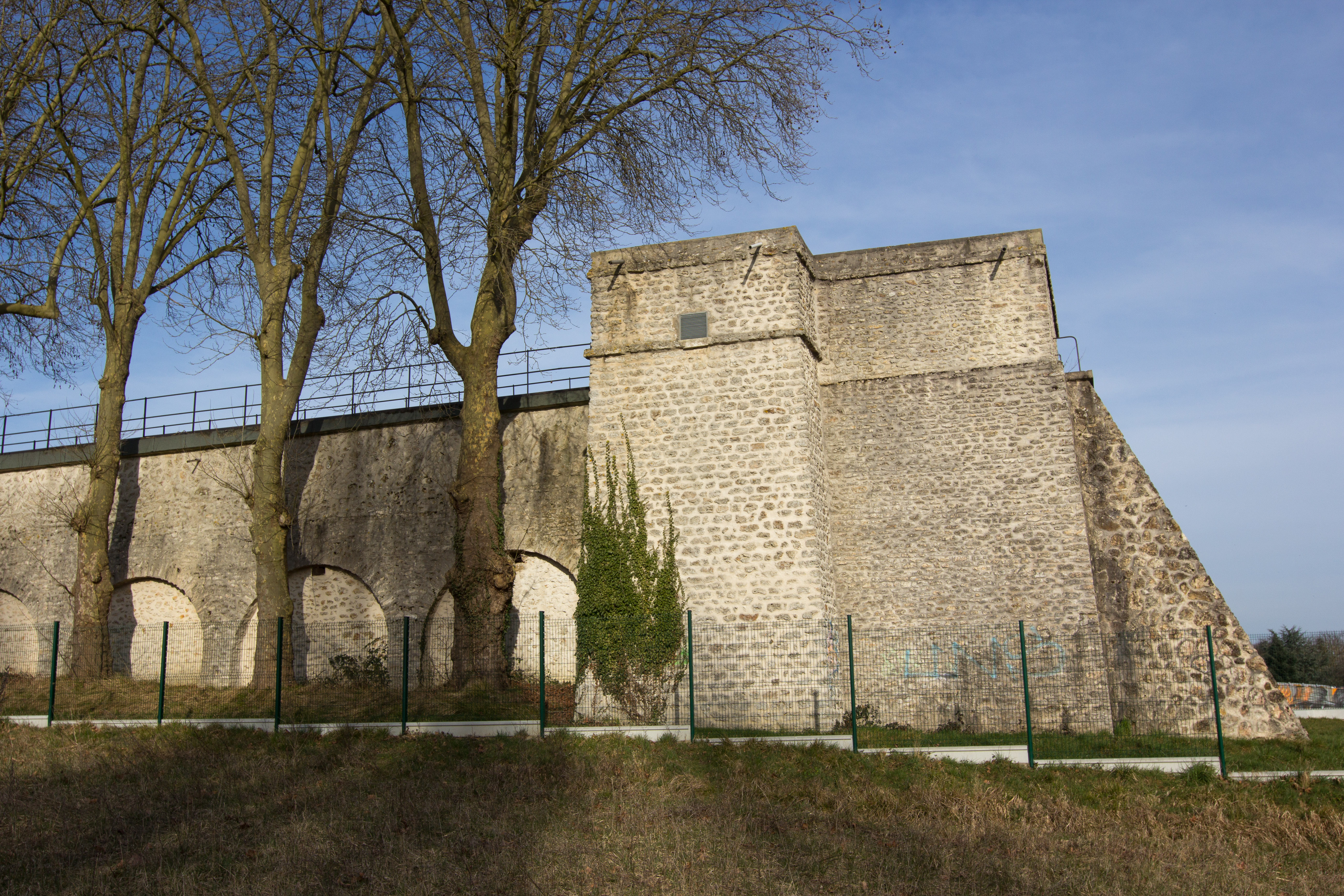 L'aqueduc de la Vanne à Villabé - Siphon au dessus de l'Essonne / Villabé / Essonne / France